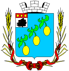 Герб м.Валки: Герб м.Валки